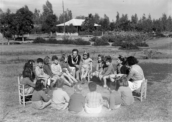 "מסילות" - עמק בית שאן - שיעור לזימרה לילדי כיתה א